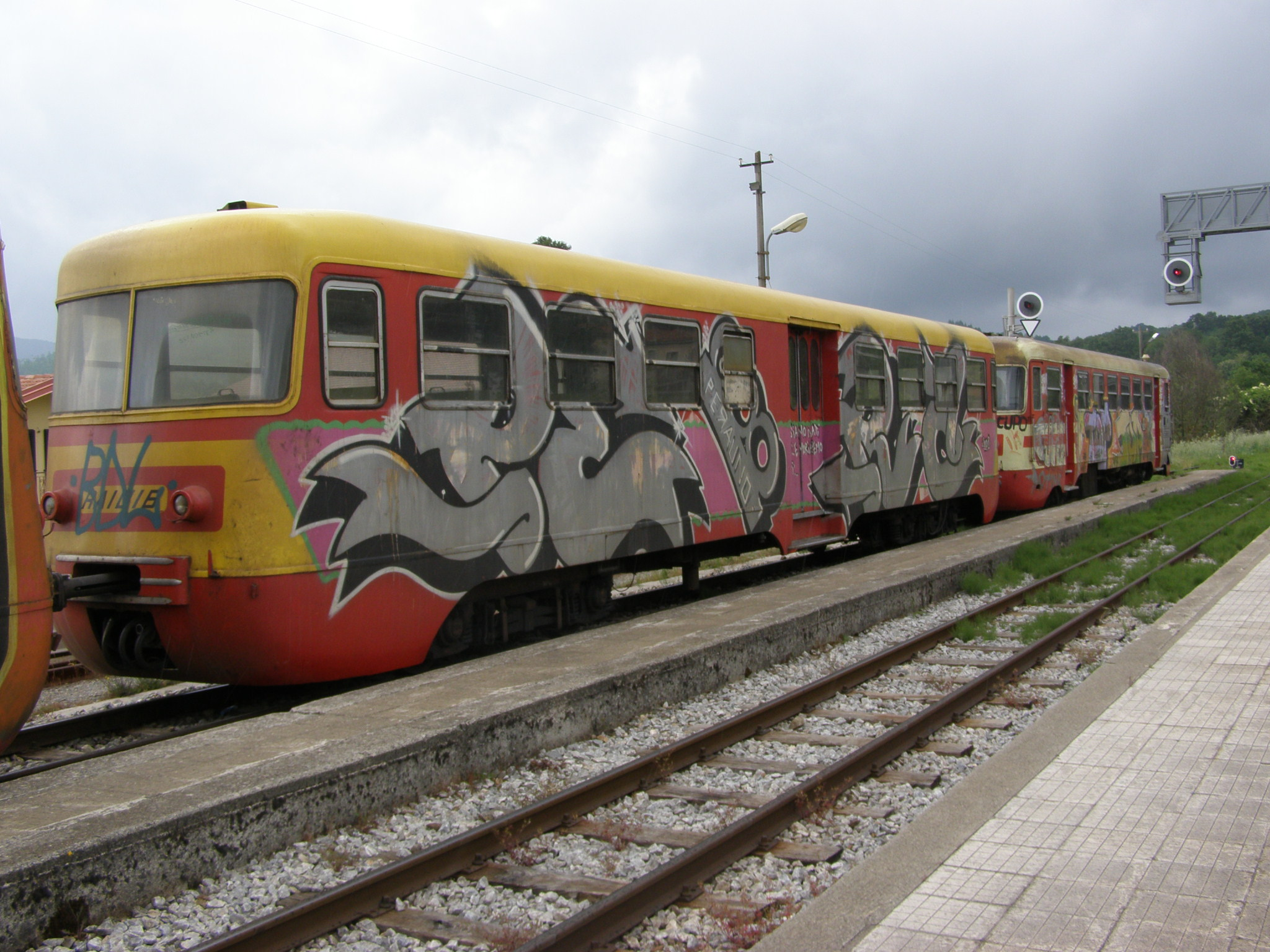 Rimorchio RA 1018 a Soveria Mannelli